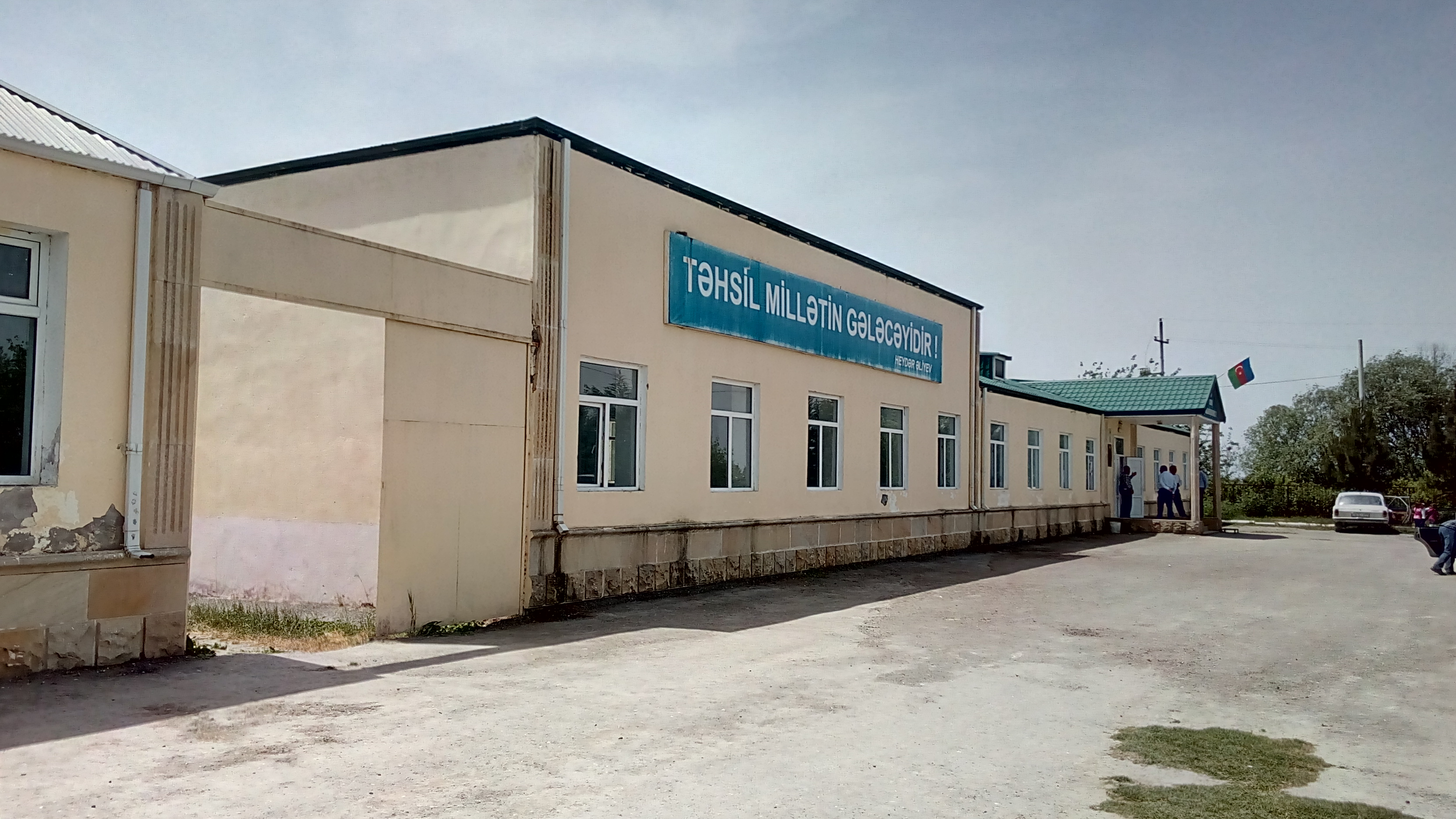 Sabirabad, Murad Hüseynov adına Əsgərbəyli tam orta məktəbi